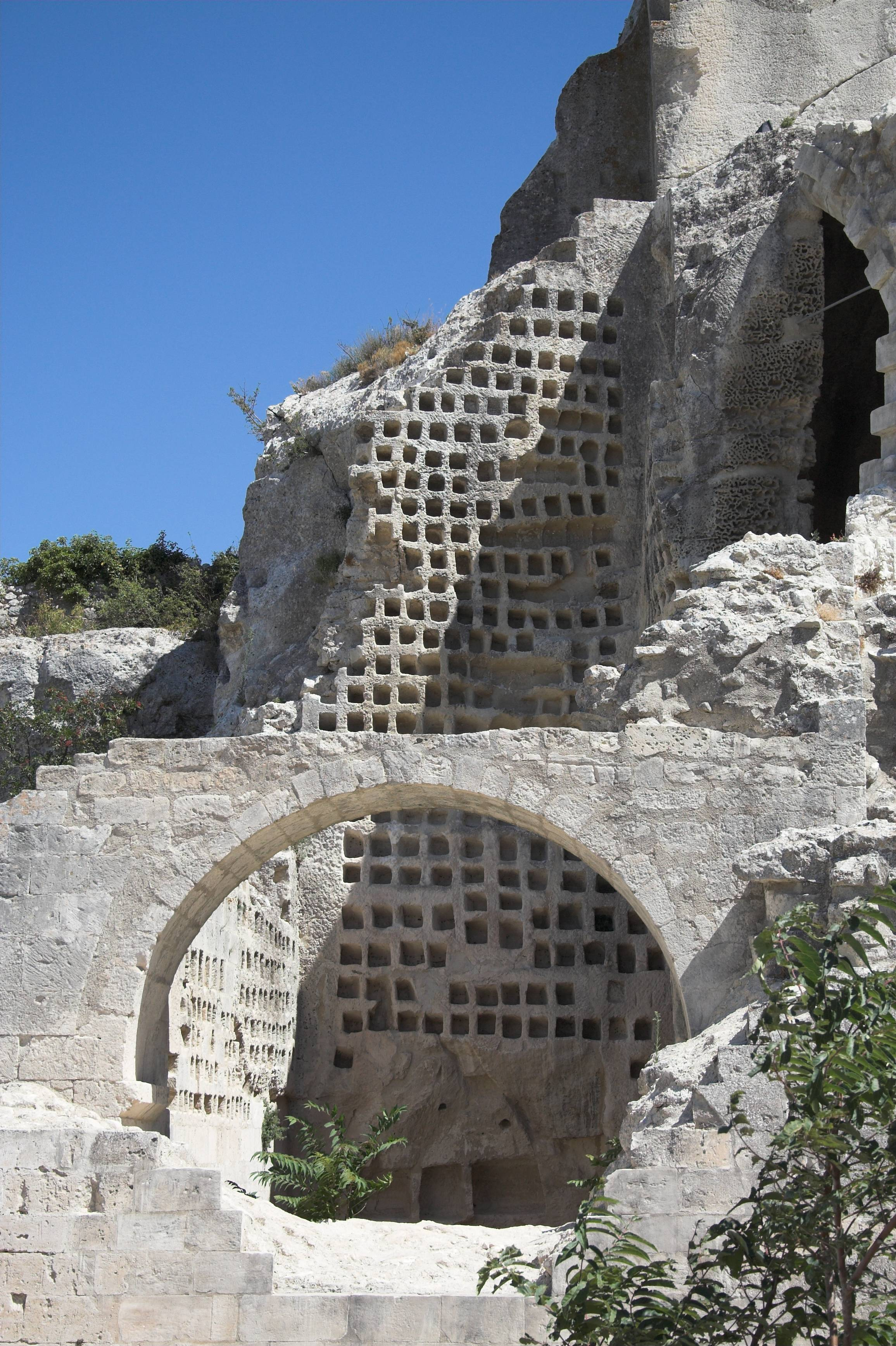 pigeons' nests (Les Baux de Provence, France)